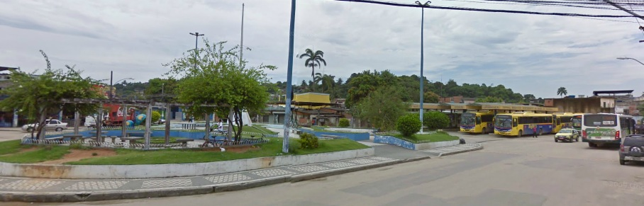 Praça